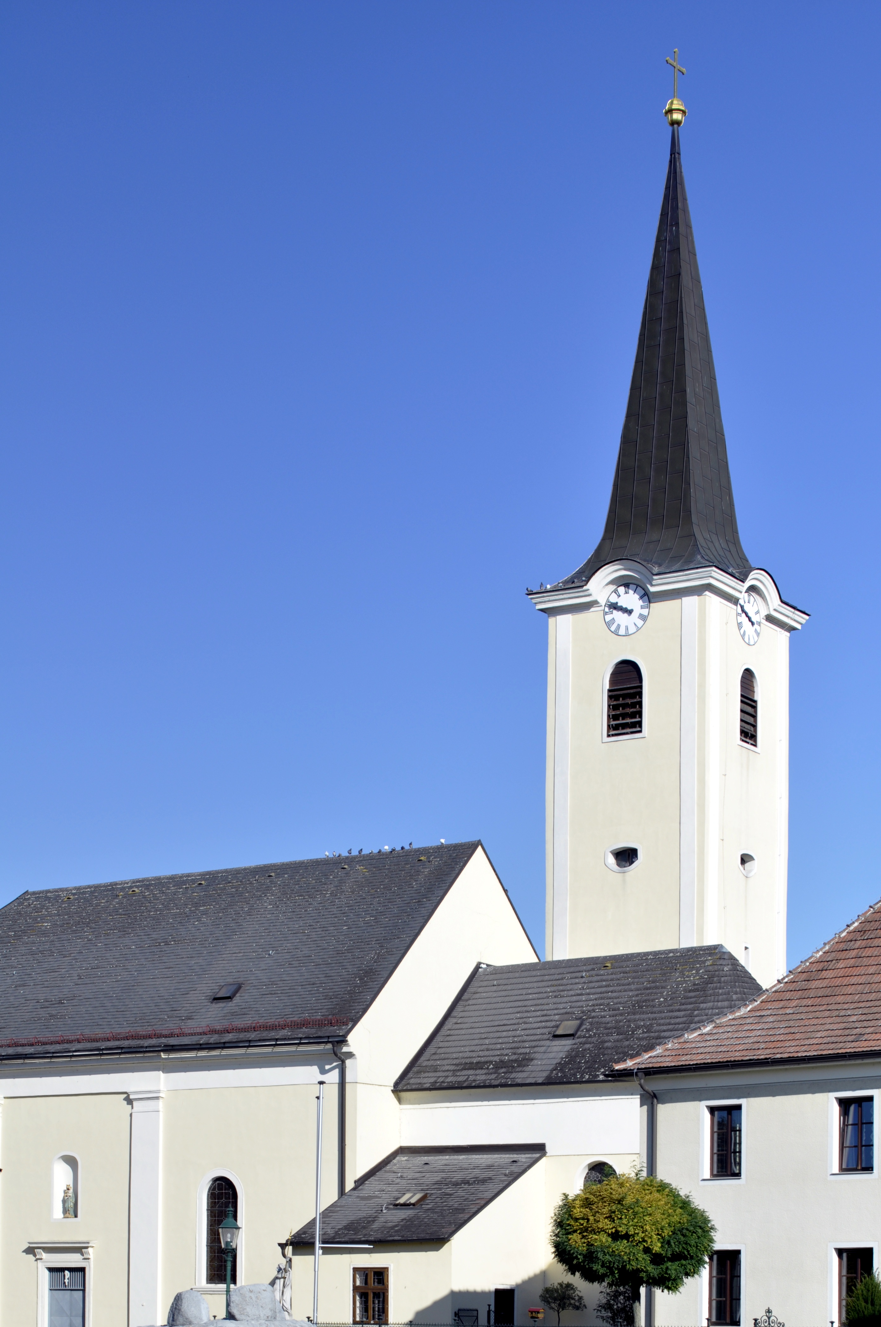 Kath. Pfarrkirche hl. Mauritius in Absdorf, NÖ